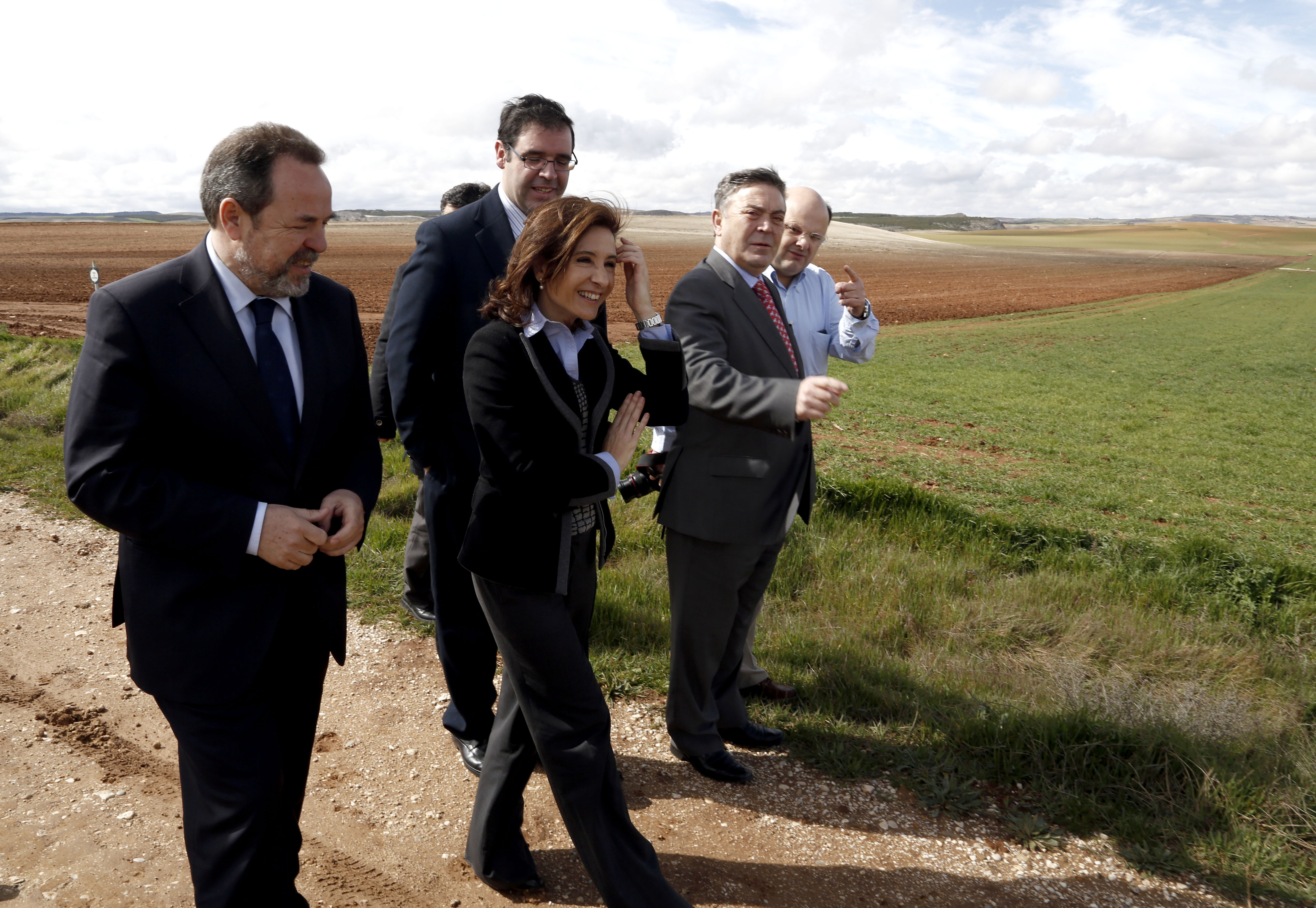 Marta García de la Calzada firma un convenio con ENRESA y el Ayuntamiento de Villar de Cañas.